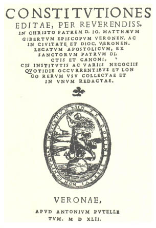 Constitutiones, Venezia 1542